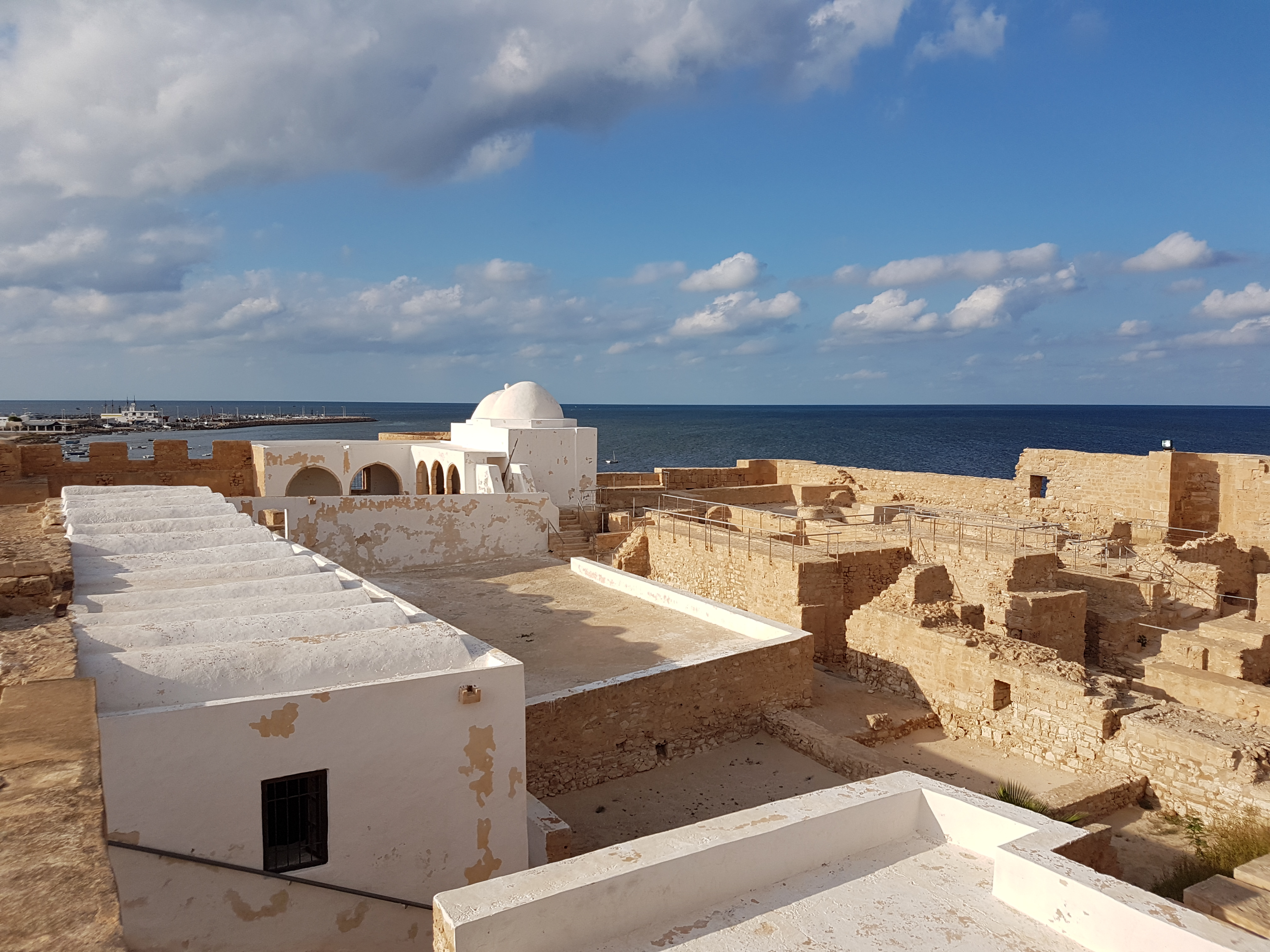 Kasba